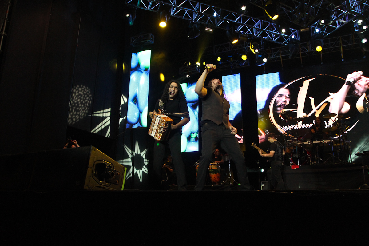 Grupo La Noche en Antofagasta